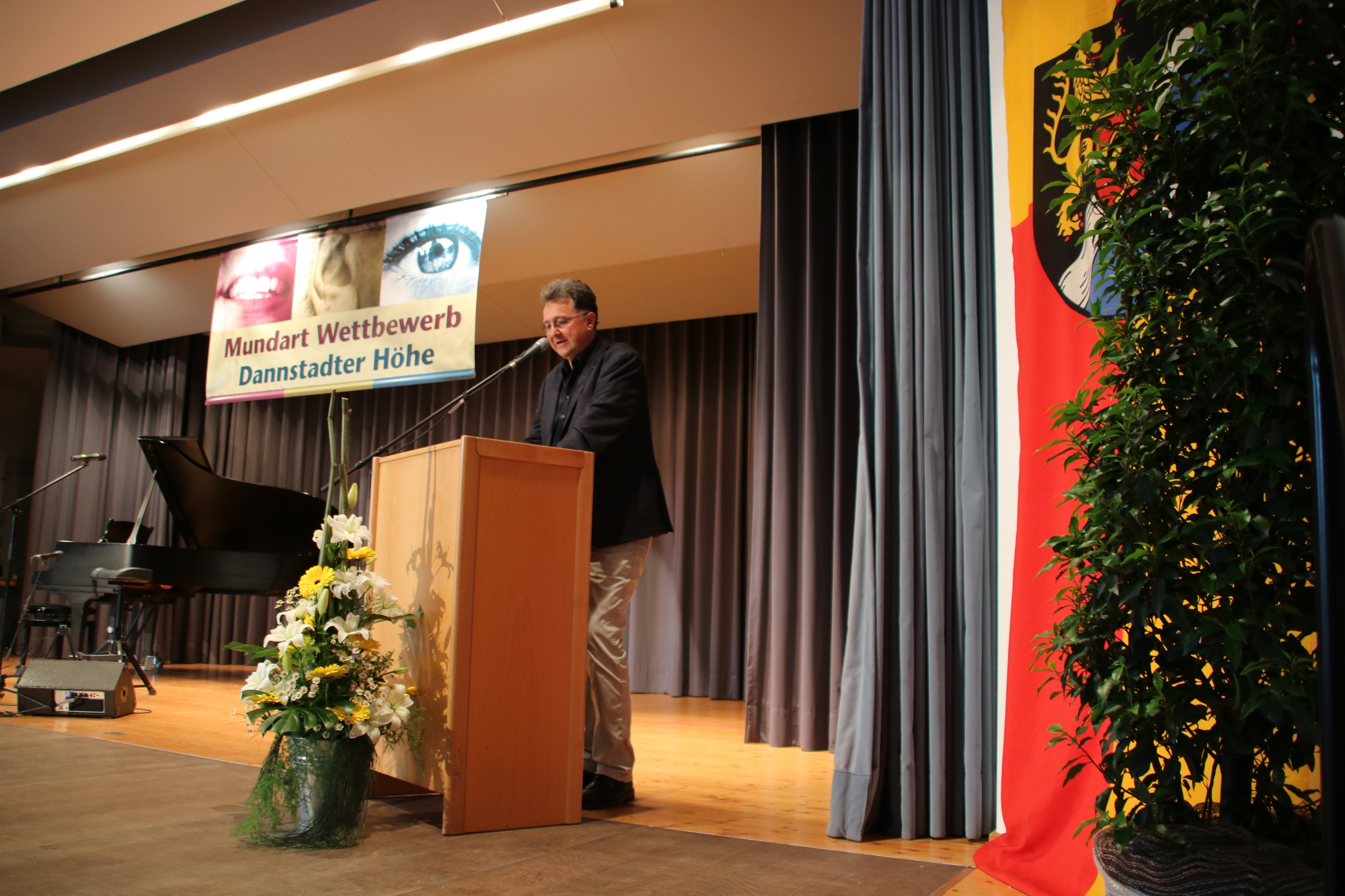 Eröffnung des Mundartwettbewerbs Dannstadter Höhe 2018